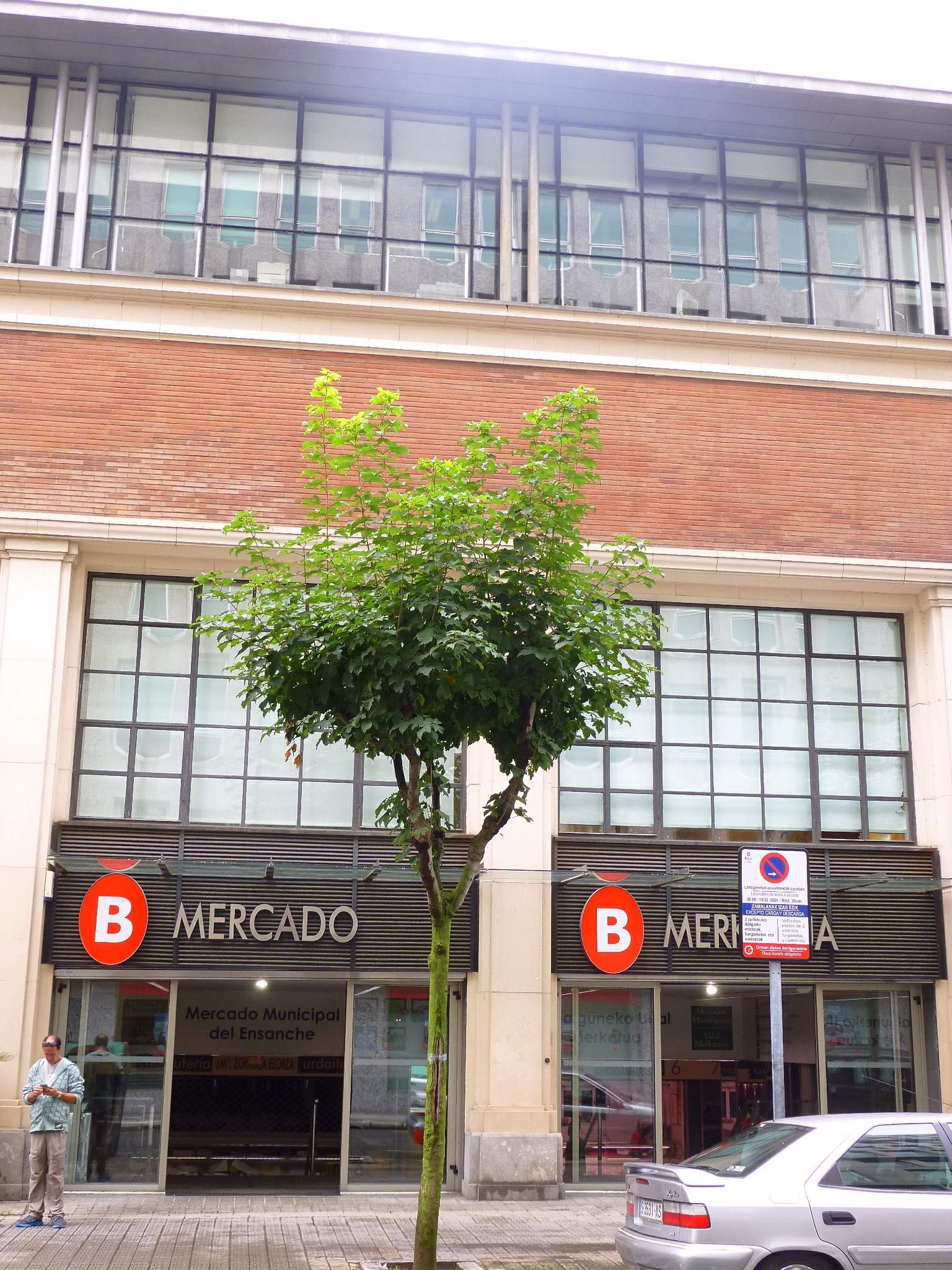 Mercado del Ensanche (Bilbao)